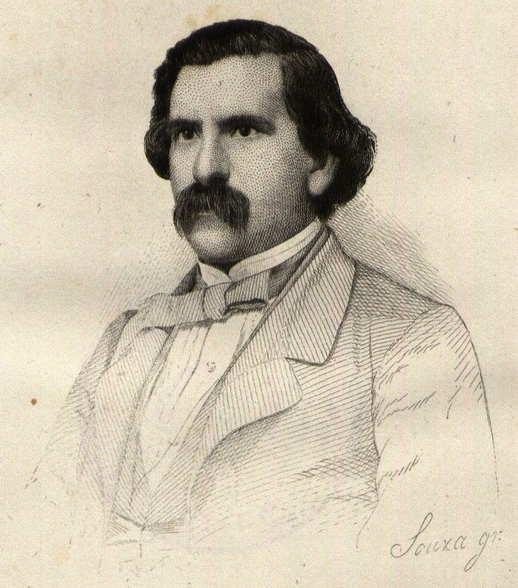 João de Andrade Corvo (1824-1890)